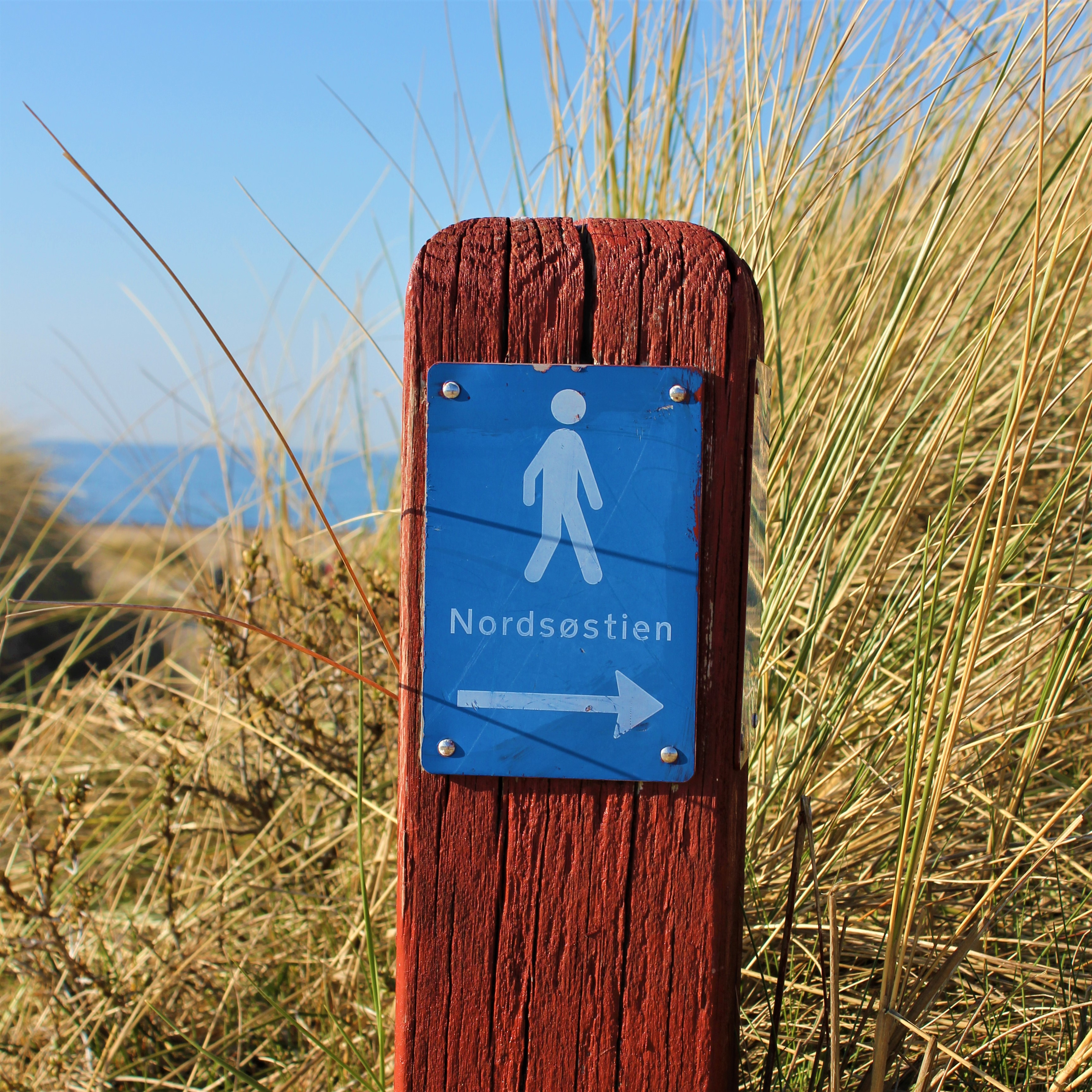 Officielt vejvisningsskilt på Nordsøstien ved Svinkløv Badehotel.